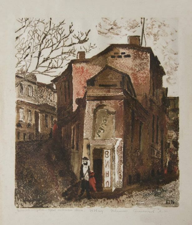 «Винный погреб. Старый Тбилиси». «Сухумский» период. 32х27.5, монотипия